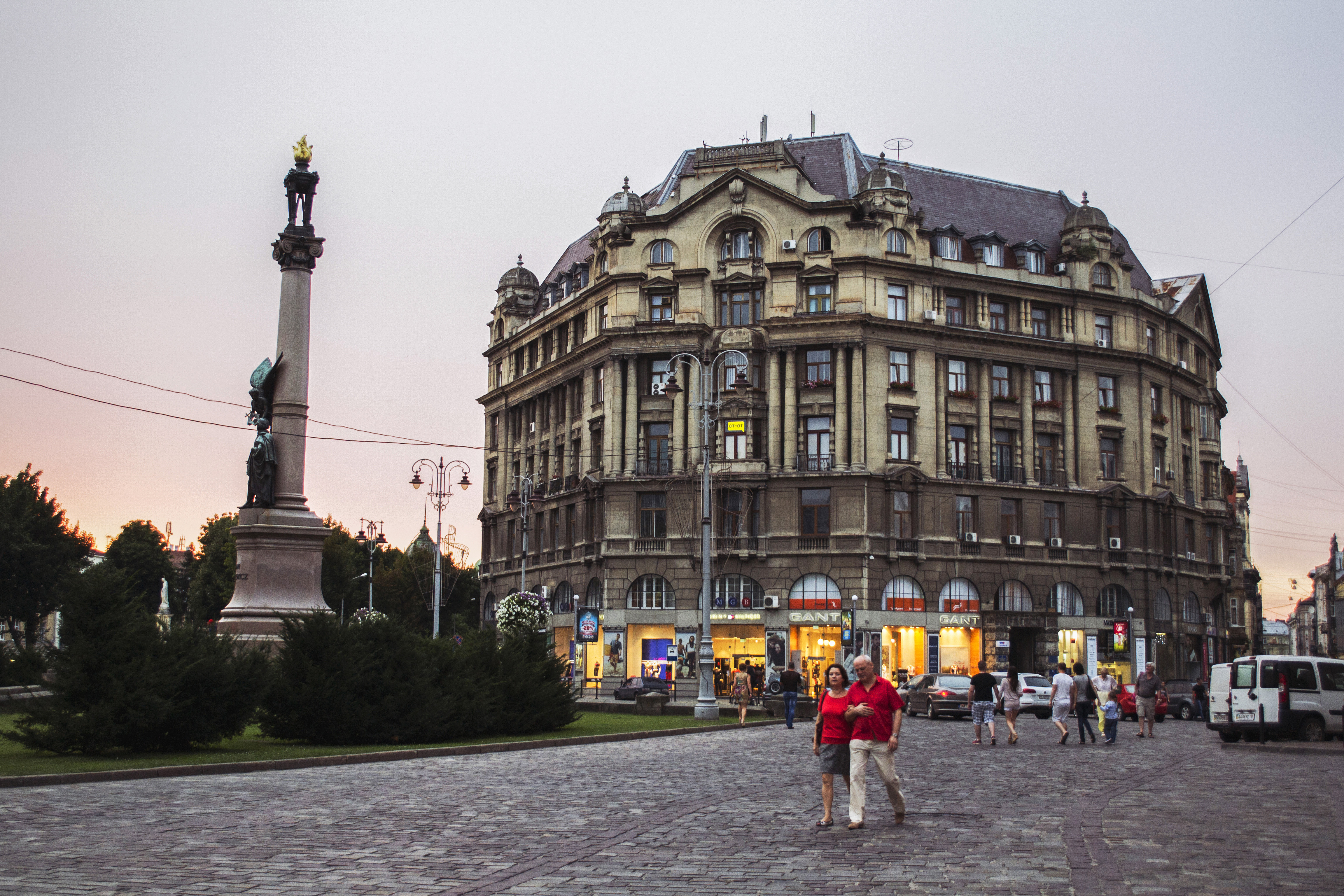 адміністративний будинок, Львів, Міцкевича А. пл., 8